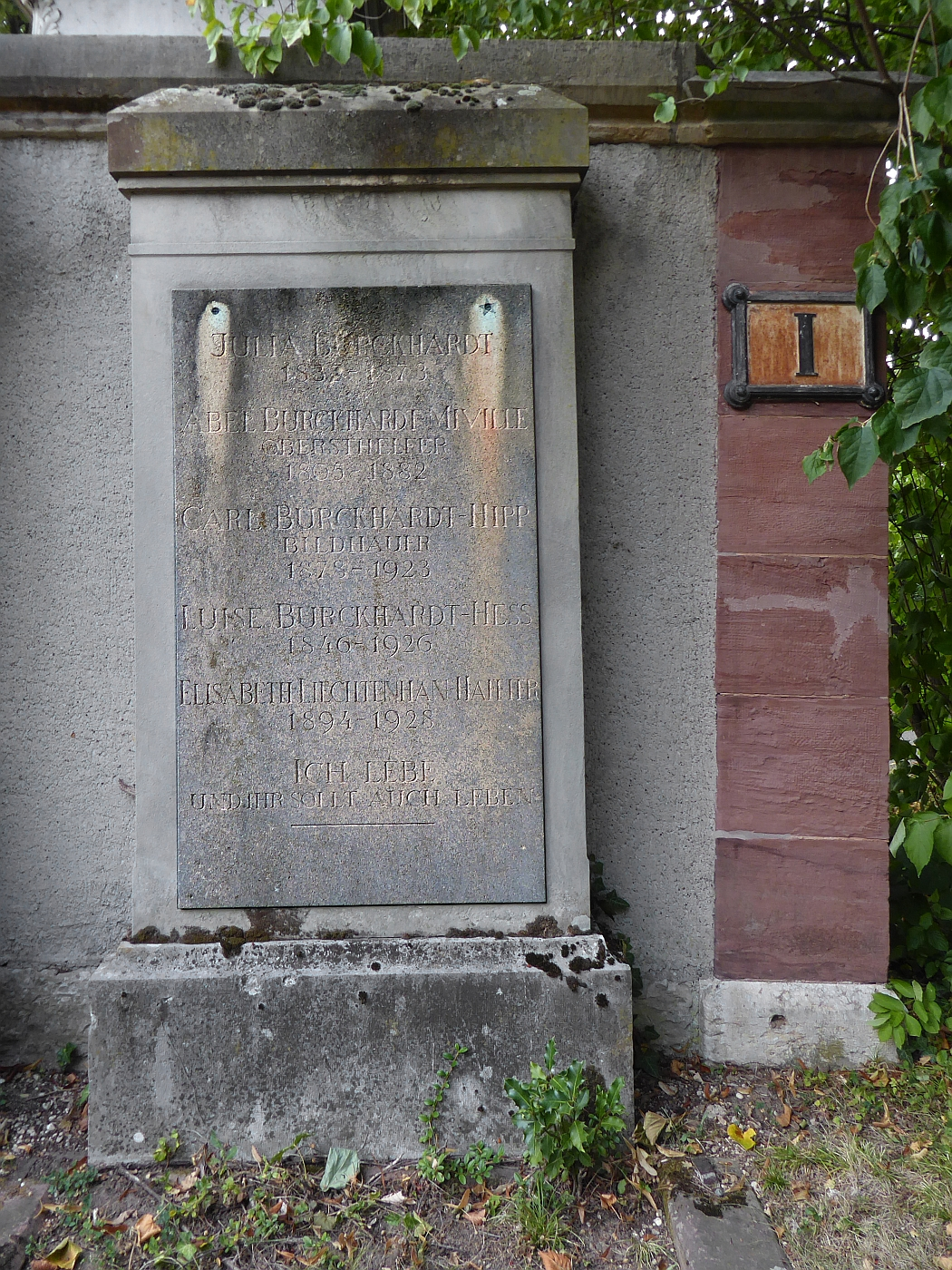 Carl Burckhardt (1878-1933) Maler und Bildhauer, Grab auf dem Friedhof Wolfgottesacker, Basel